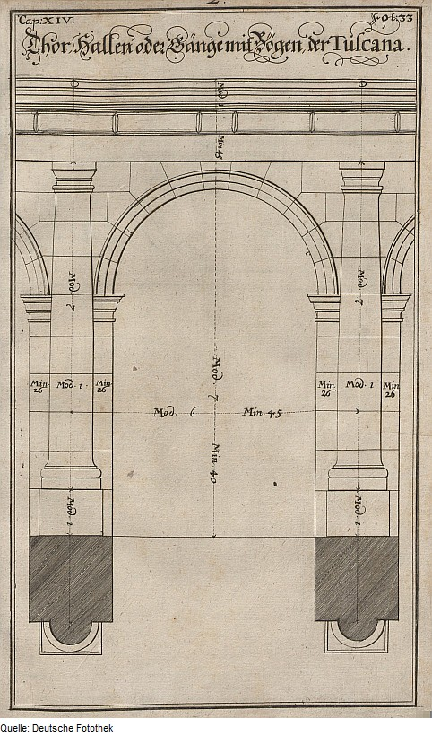 Original image description from the Deutsche Fotothek Architektur & Bauwesen & Torbogen & toskanische Ordnung